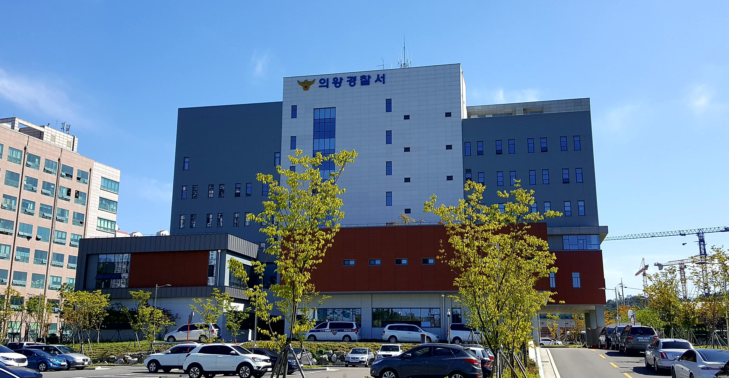 신 의왕경찰서